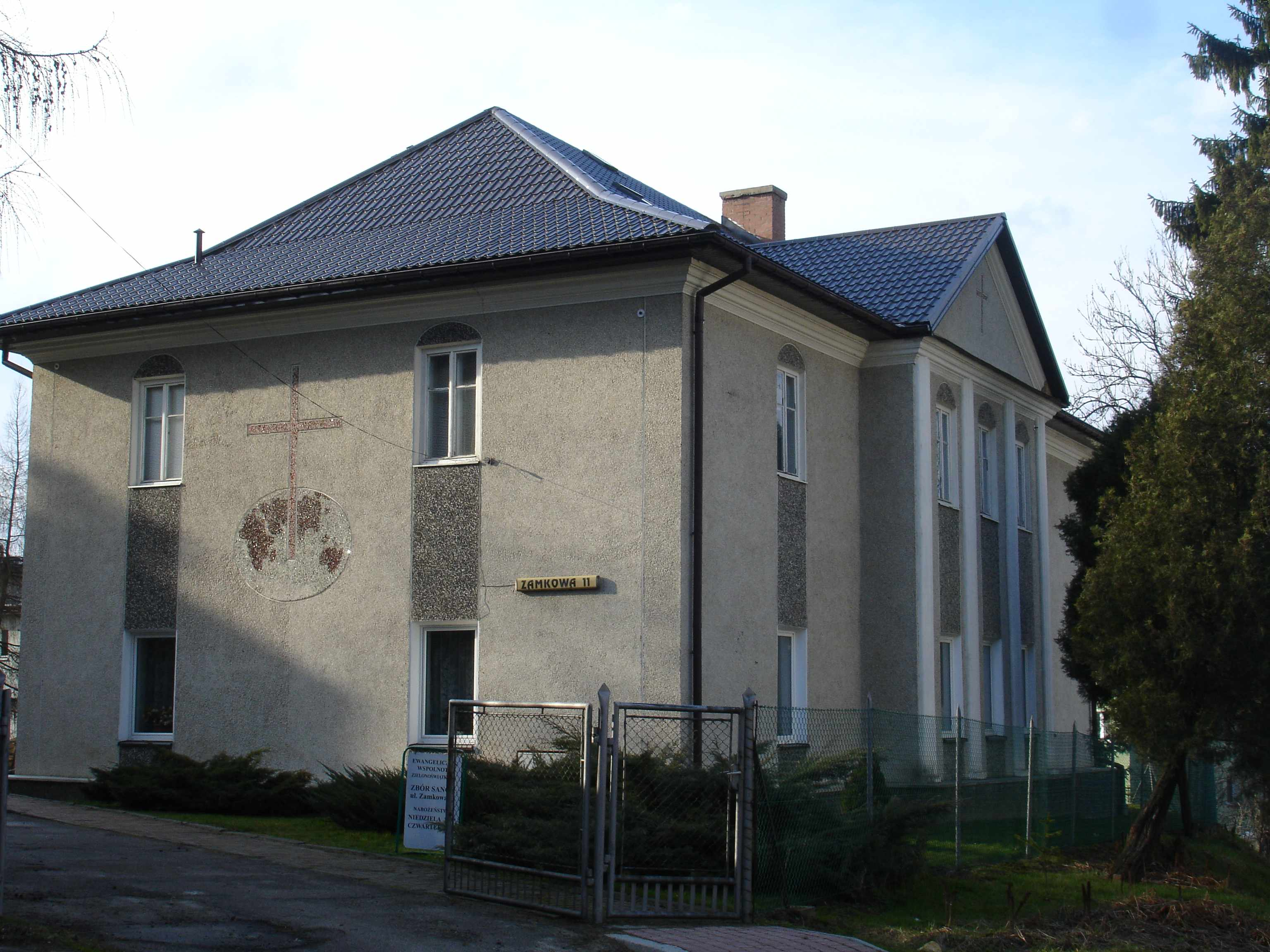 Ewangeliczna Wspólnota Zielonoświątkowa Zbór w sanoku ul. Zamkowa